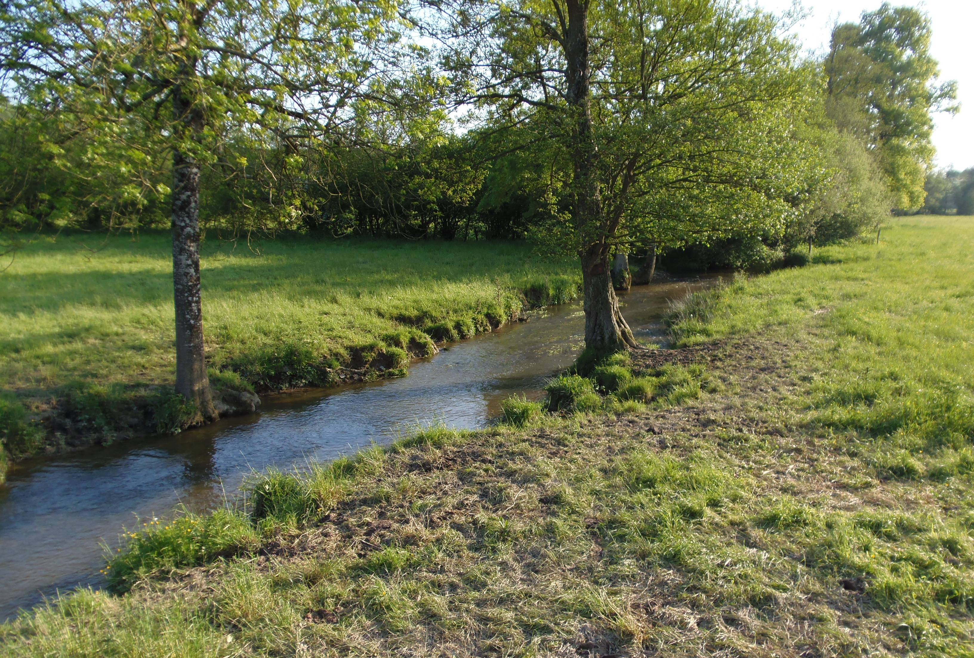 La Drôme entre Morigny, en arrière-plan, et Montbray, au premier plan (Normandie, France).